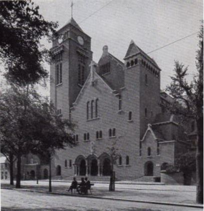 Cathédrale de Saint-Laurent et Sainte-Elisabeth en 1922.